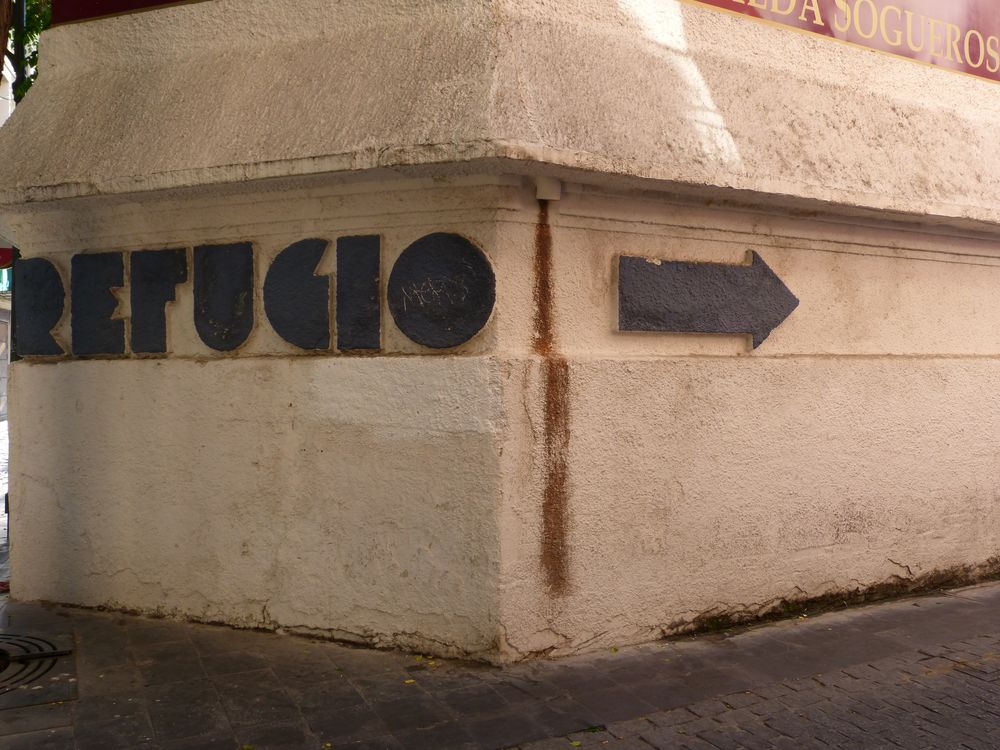 Tipografía Art Decó en una calle de la Ciutat Vella de Valencia. Indicaba la dirección hacia uno de los refugios de la Guerra Civil